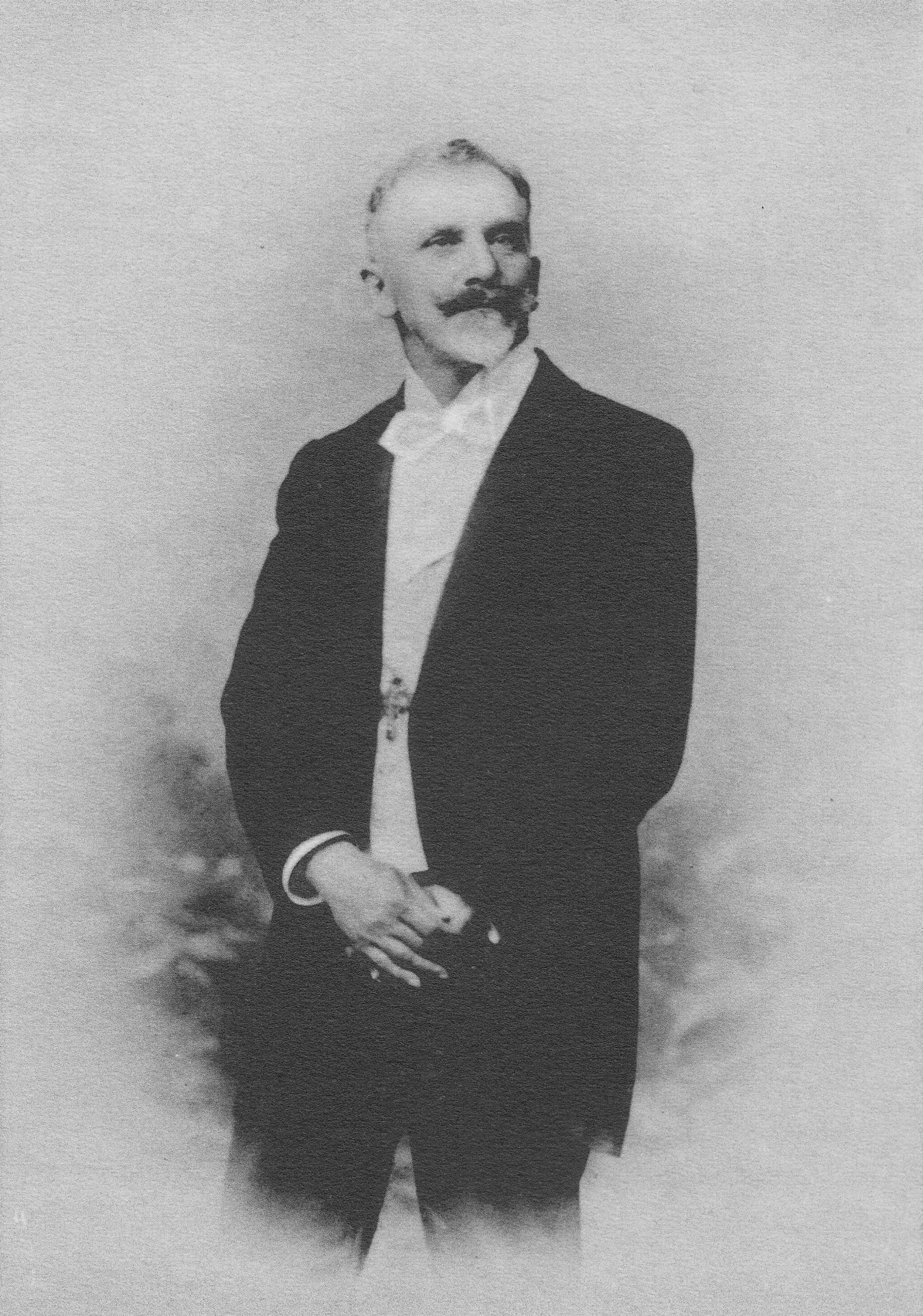 Julius Zeyer v dubnu r. 1896. Fotografie Adolf Pech v Čes. Budějovicích (původní titulek)